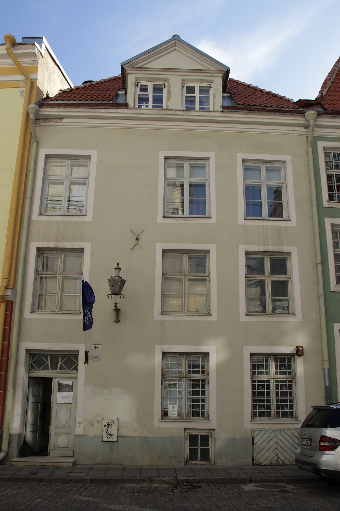 Tallinn, elamu Pikk 46, 15.-20.saj